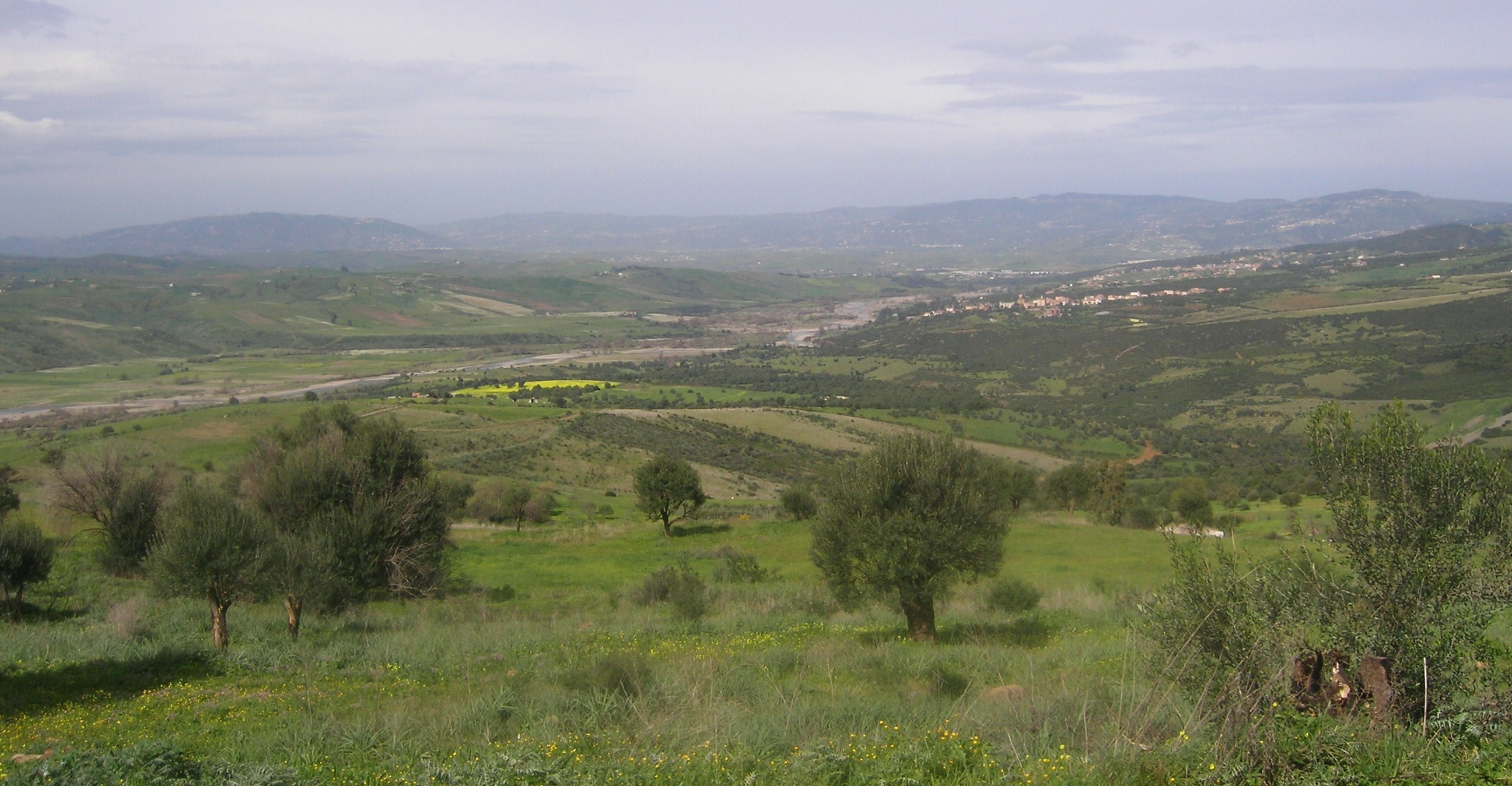 Une partie de la vallée Sebaou et la rivière du même nom en Kabylie. Phot prise depuis Taslent à l'intersection route de Bouzeguene et la route Azazga Michelet.